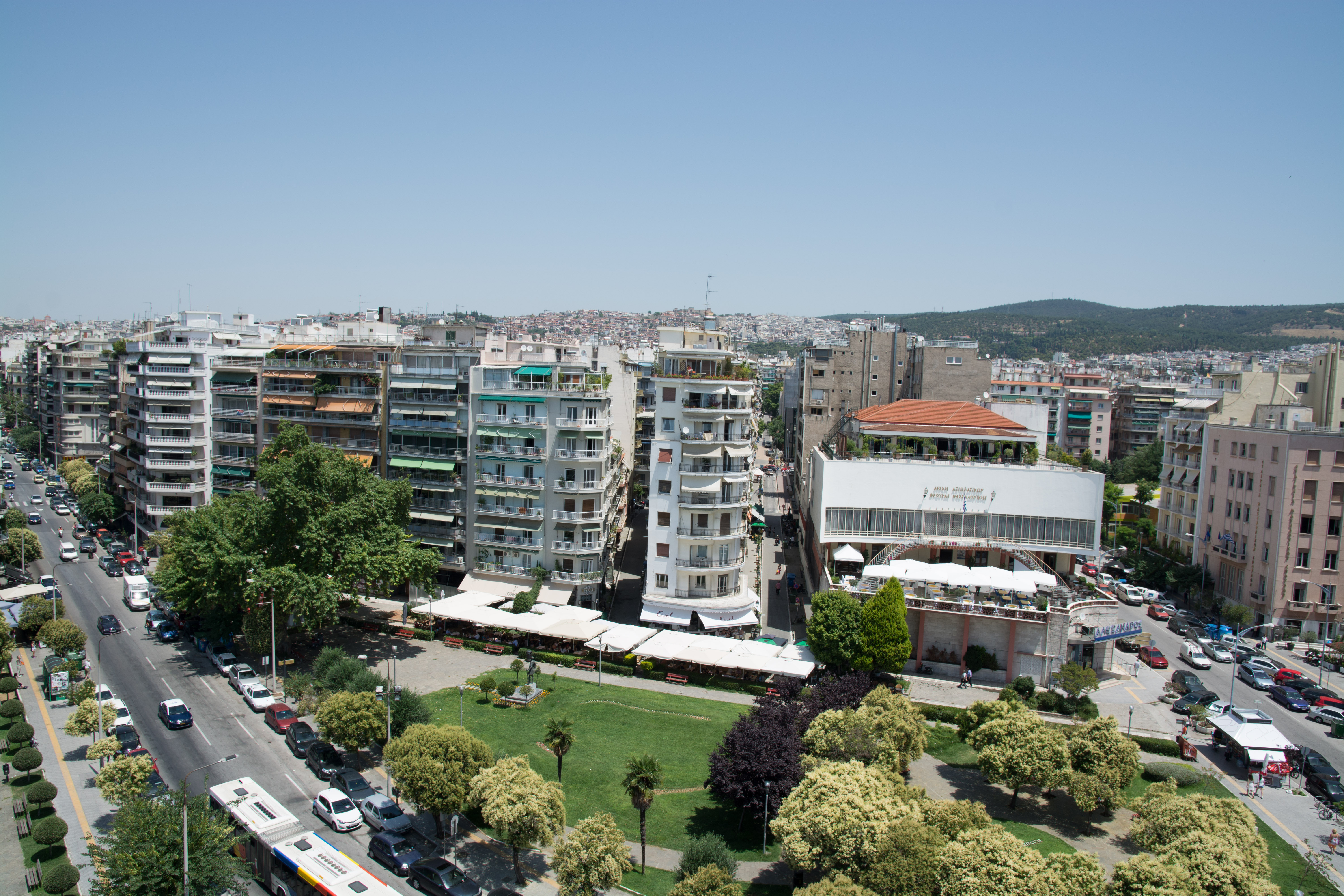 Θεσσαλονίκη 2014